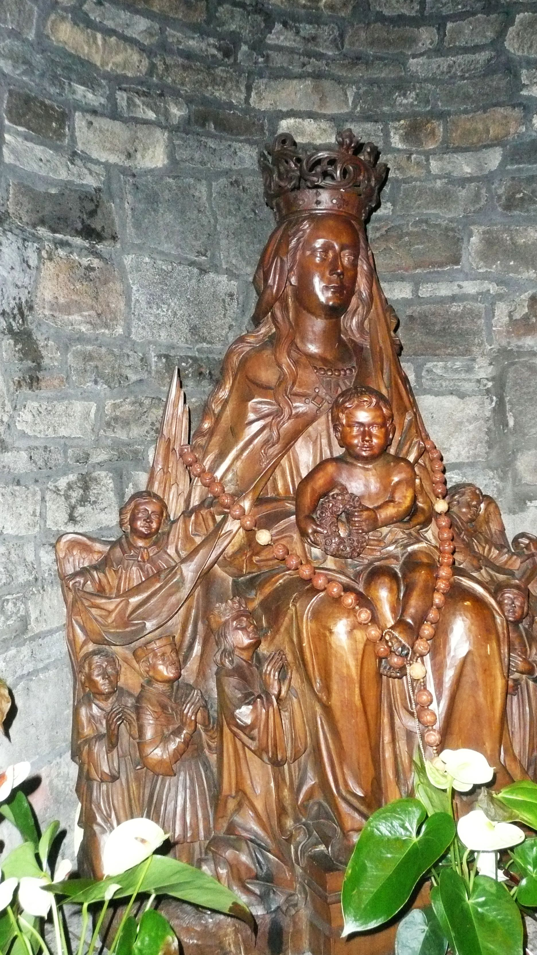 Hilden-St. Jacobus- Maria mit Jesus auf dem Schoß